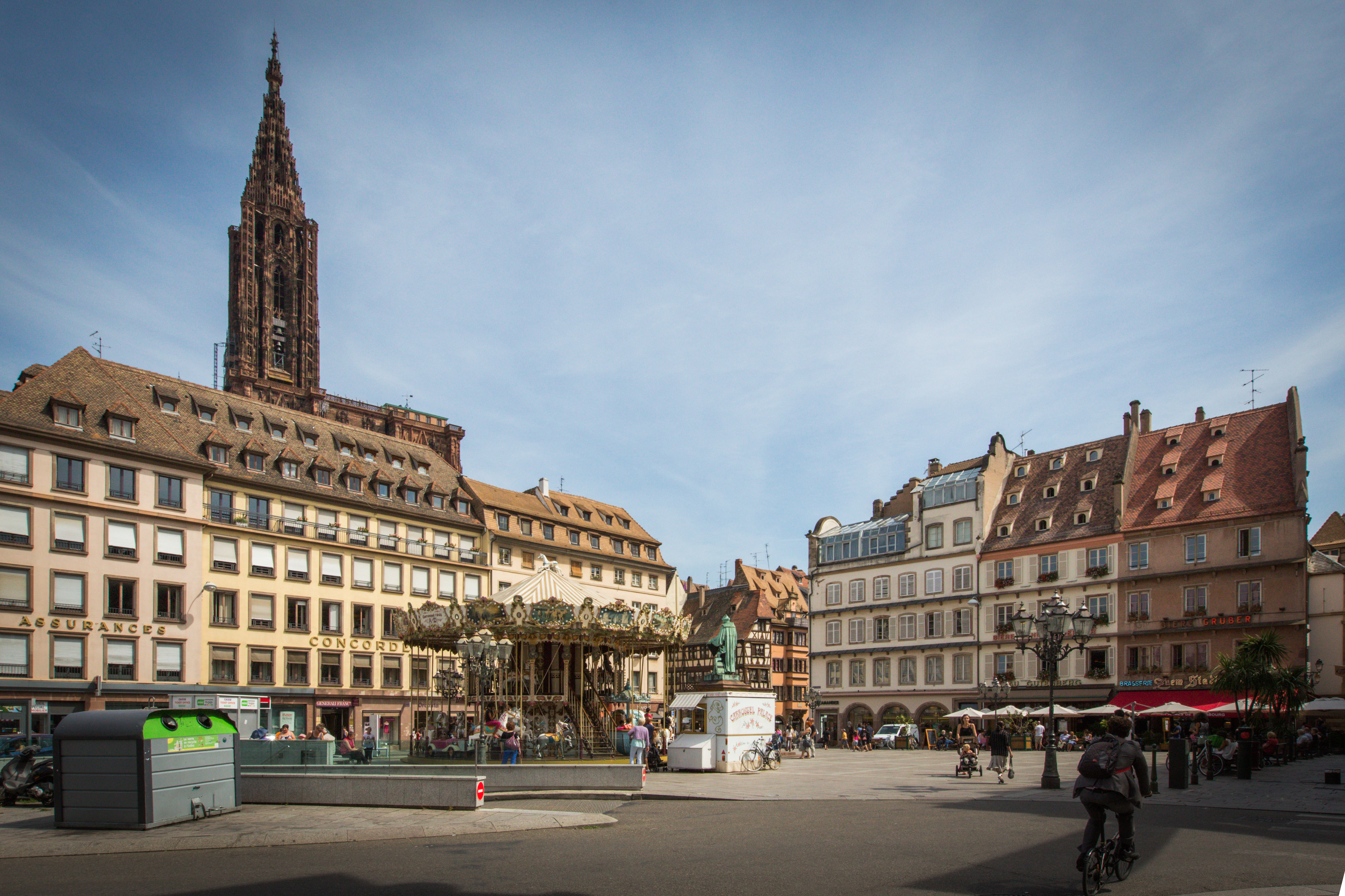 Strasbourg place Gutenberg